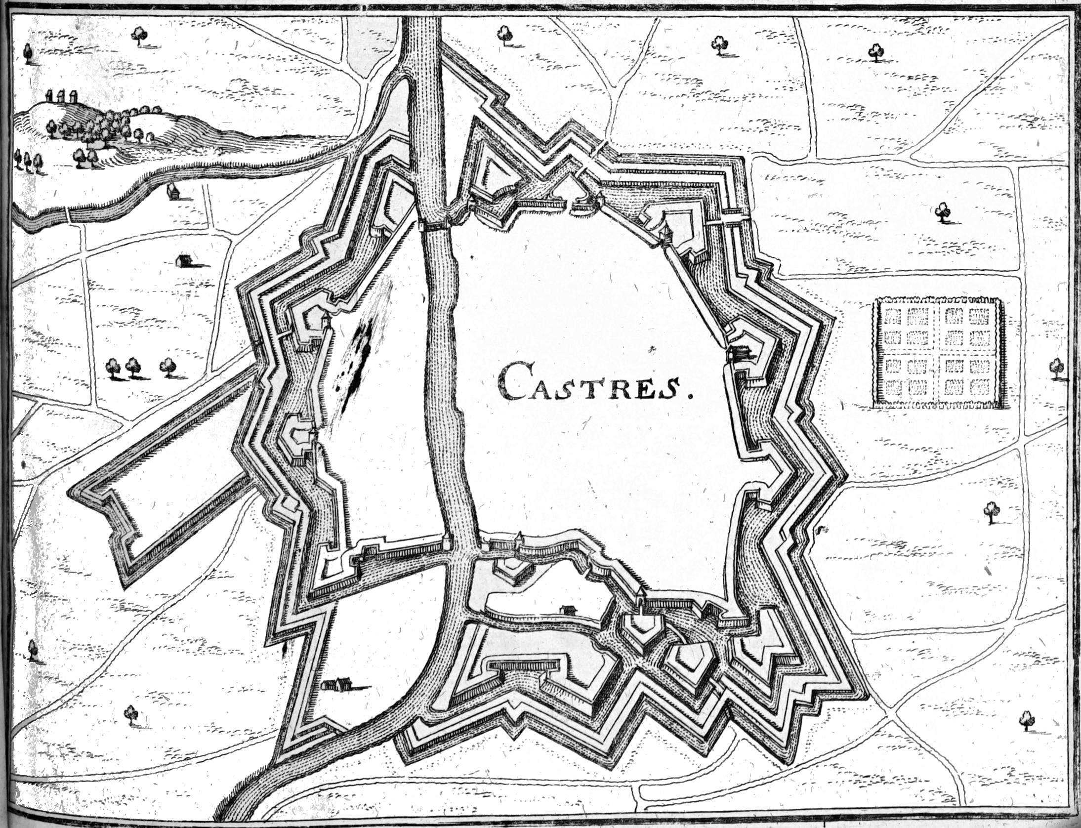 présenté dans Topographiae Galliae.